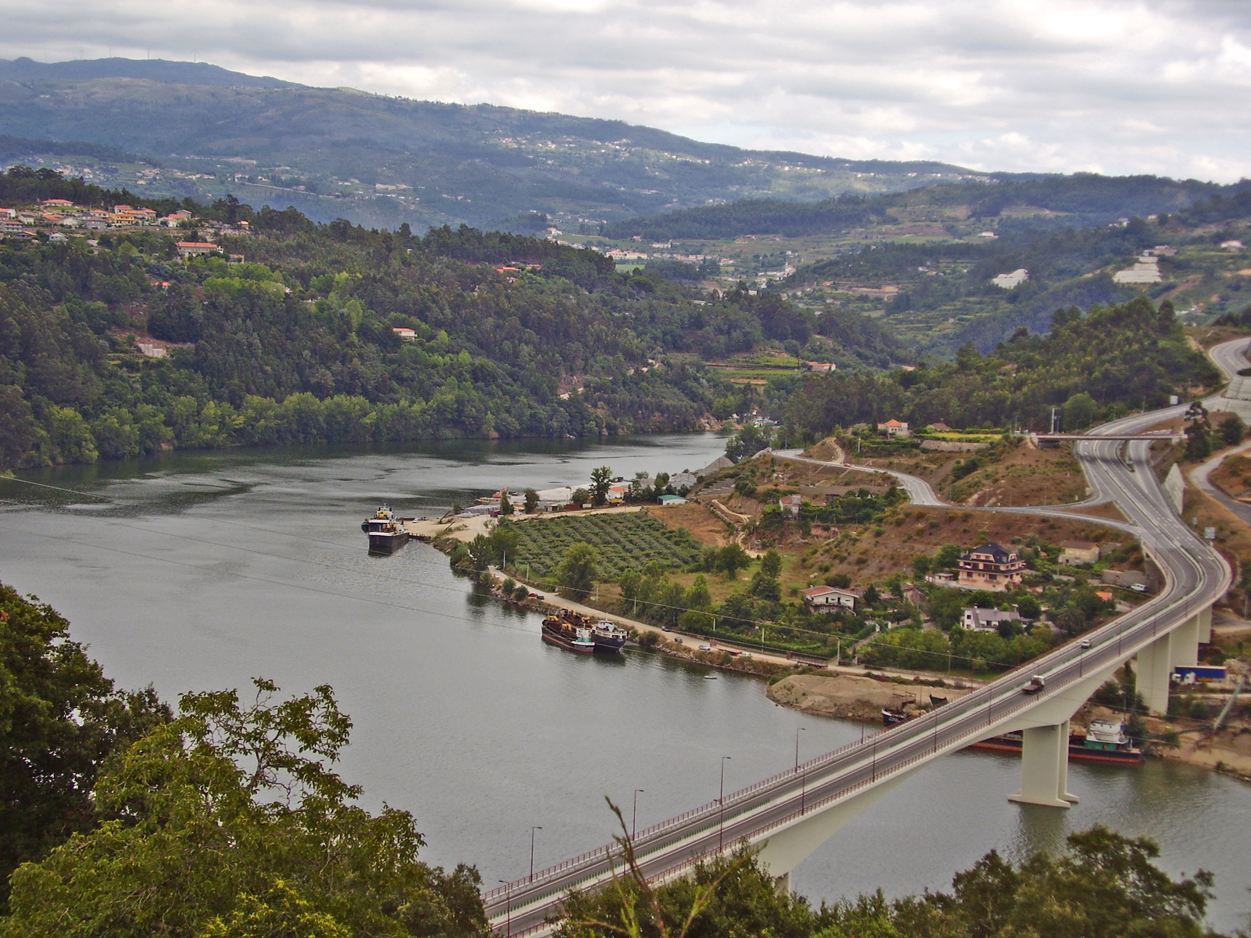 Ponte do IC35, em Entre-os-Rios This file was uploaded for Wiki Loves Monuments in Portugal with the unique identifier 97028417.